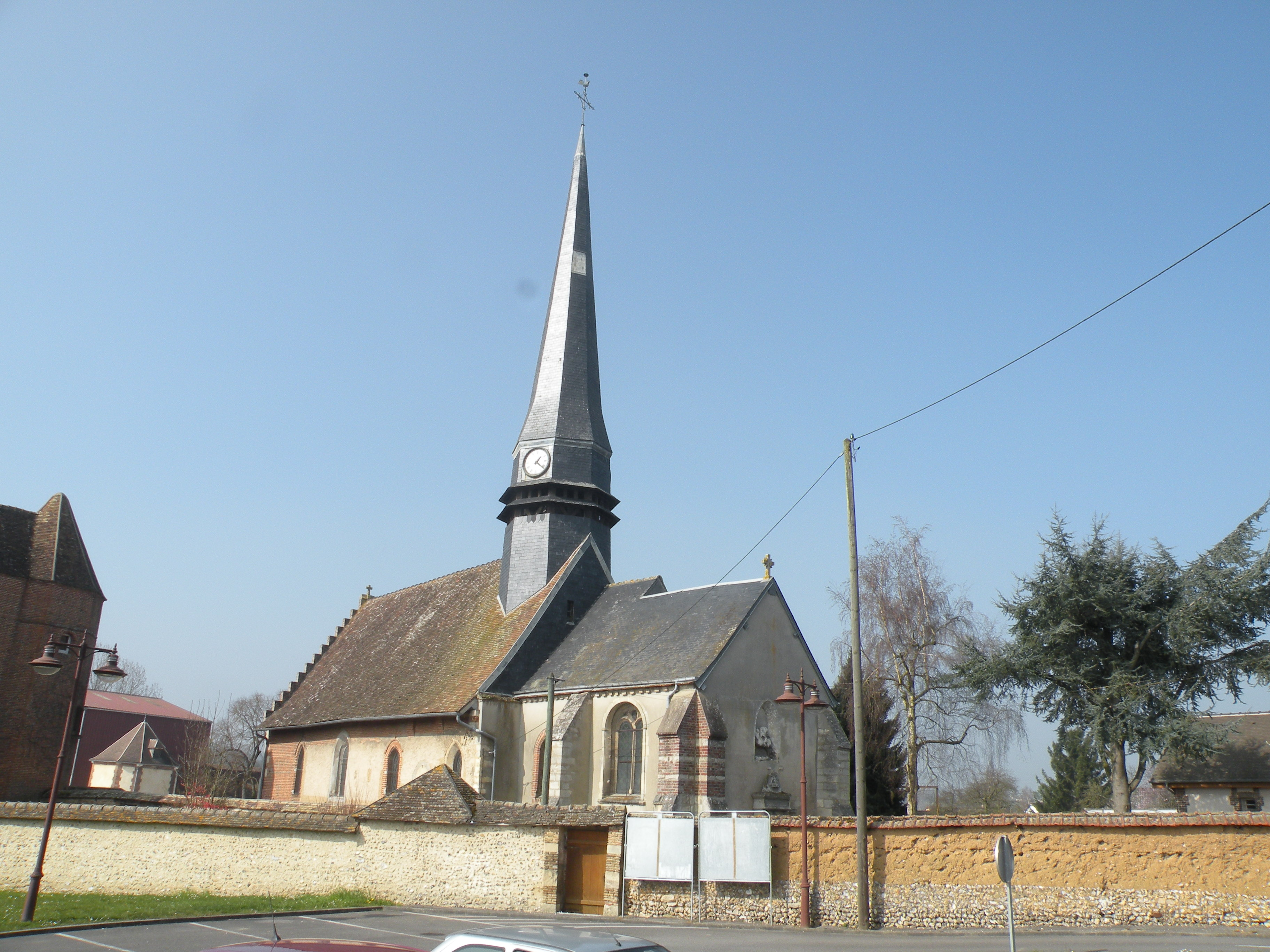 église Saint-Martin d'Éragny-sur-Epte